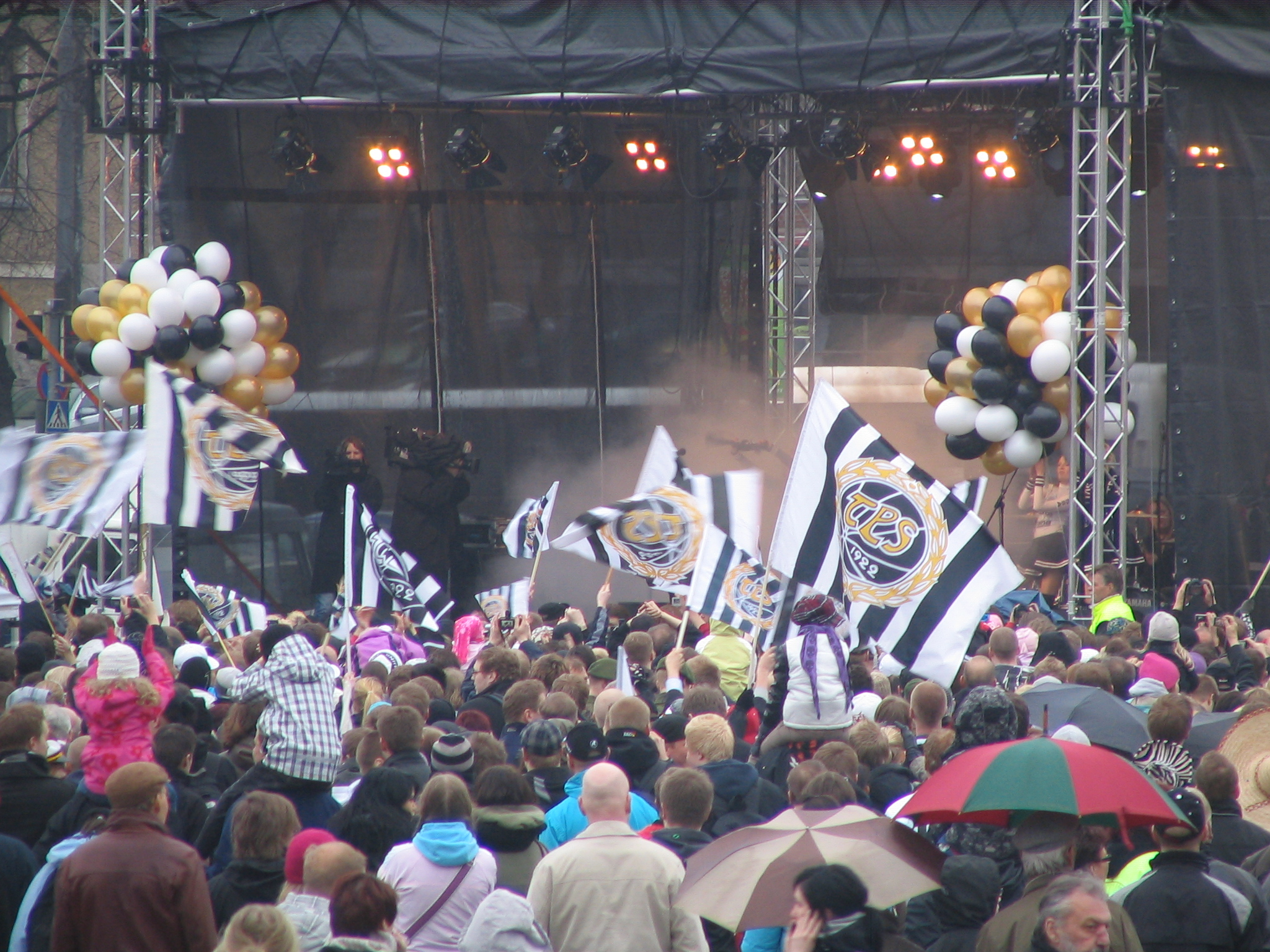 TPS:n kultamitalijuhla Turun kauppatorilla 29.4.2010. Kuvattu Wiklundin edessä olevan esiintymislavan päältä.